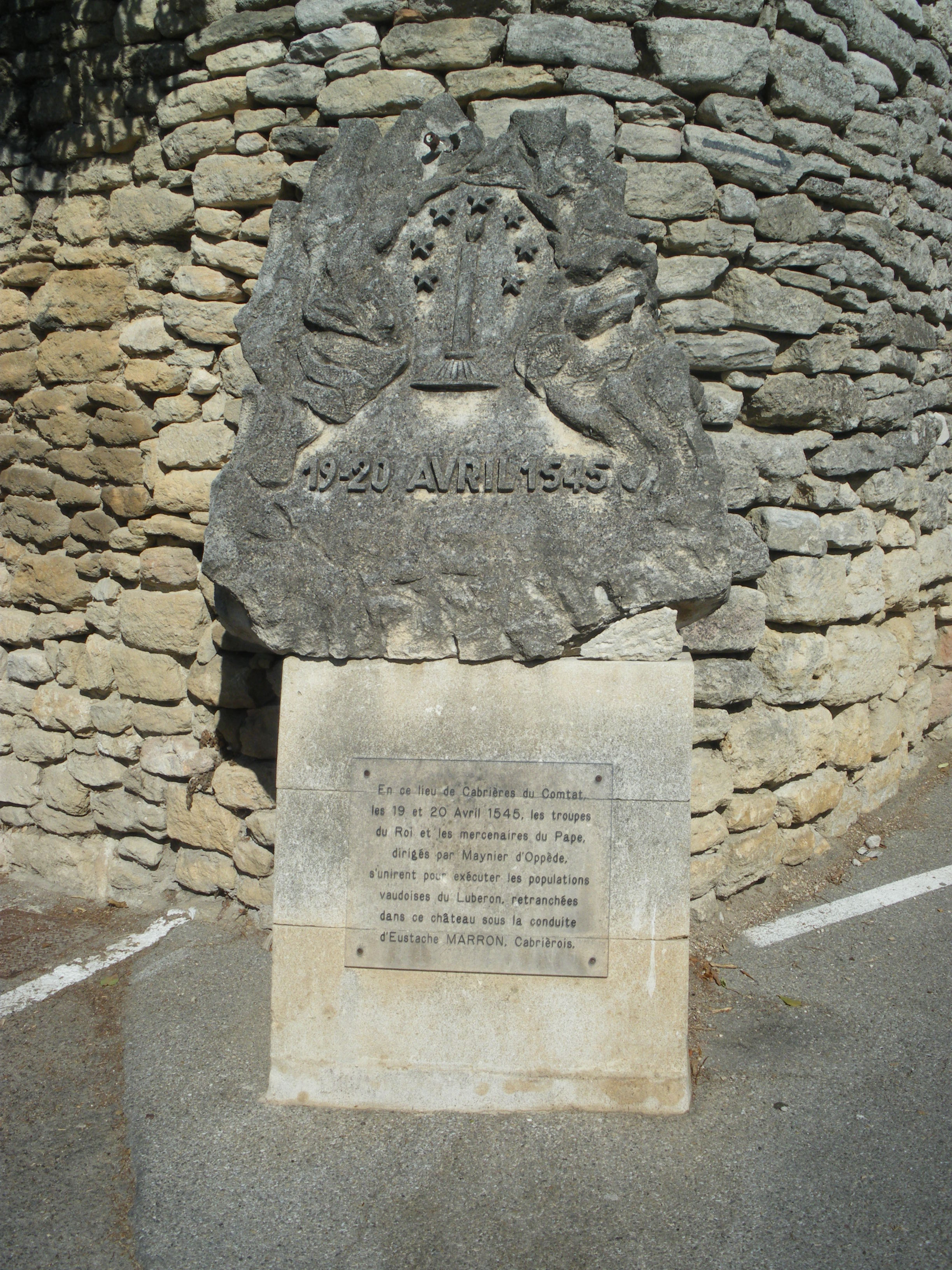 Stèle sur l'histoire des Vaudois au Chateau de Cabrières d'Avignon, Vaucluse, France